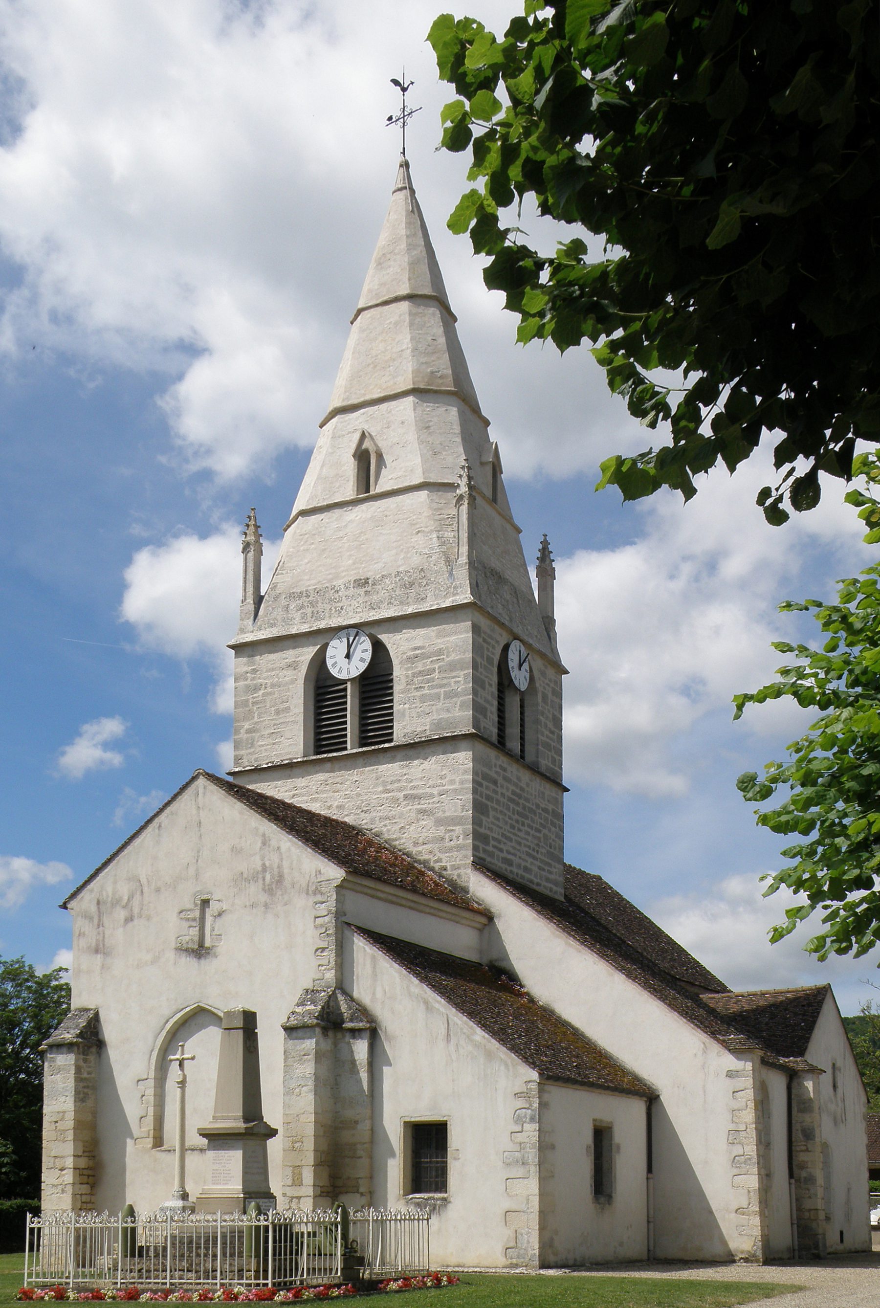 Auxey-Duresses (Côte-d'Or, France). Église Saint-Martin.